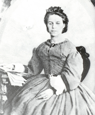 Foto van prinses marianne (overleden 1883), omstreeks 1850